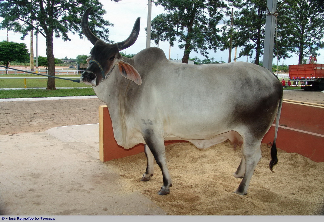 Gados em exposição na EMAPA, Avaré, estado de São Paulo, Brasil